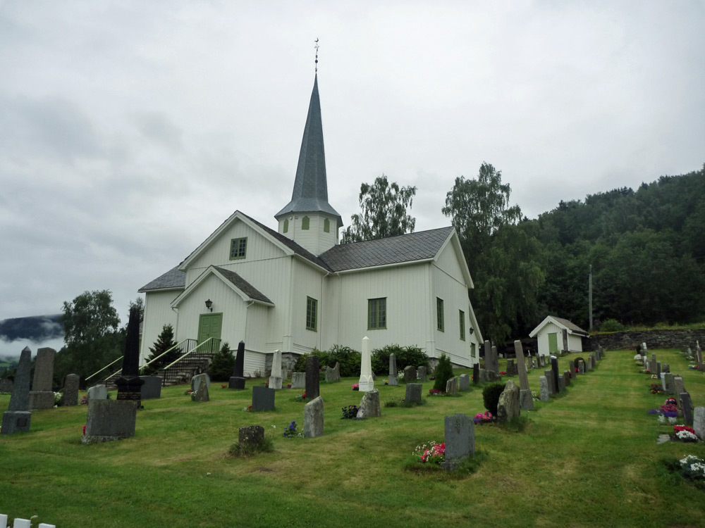 Øyer kirke